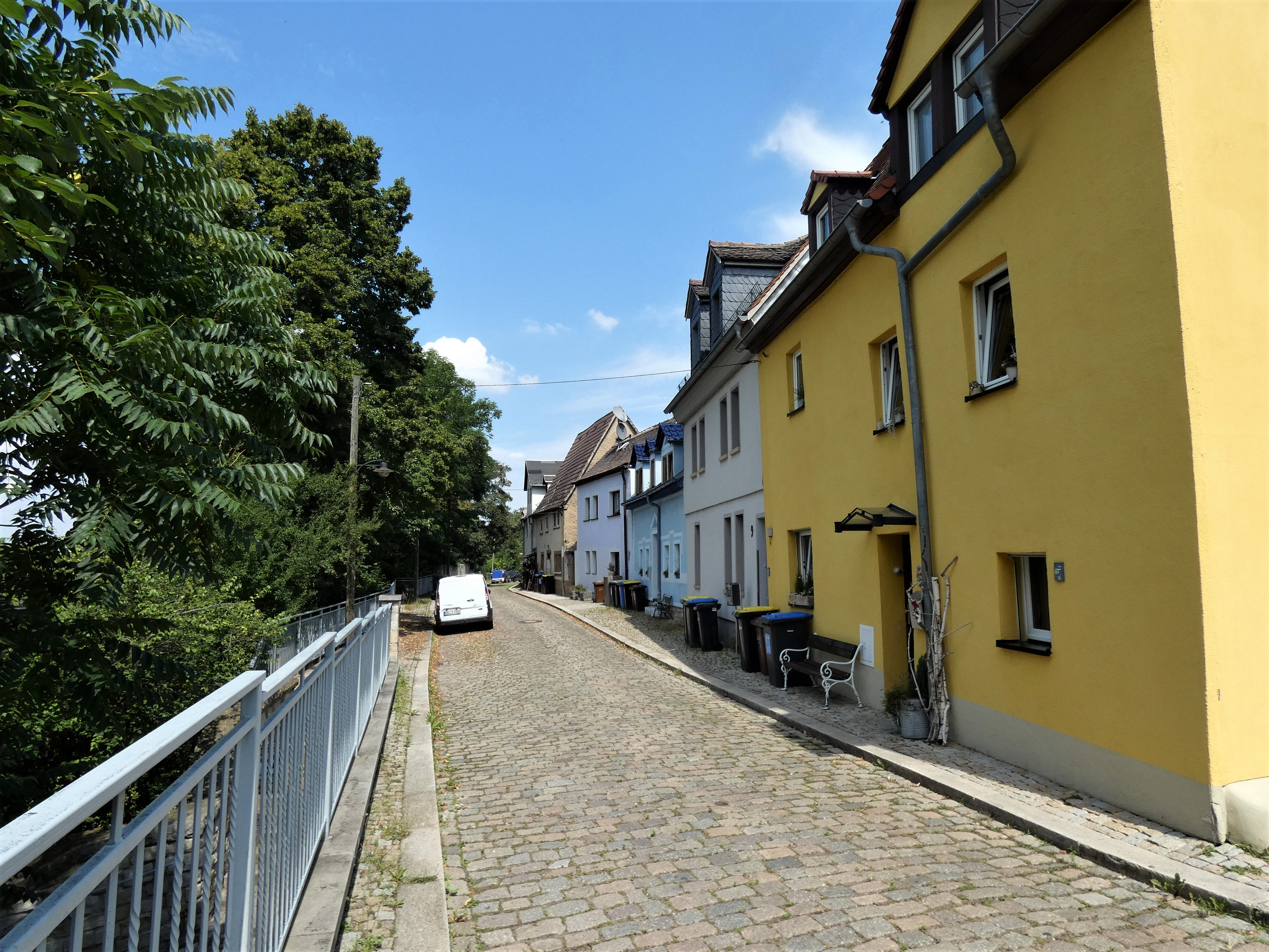 Hohe Straße, Weißenfels